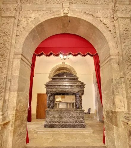 Chiesa del pp. Cappuccini, Leonforte - Sarcofago della principessa Caterina Branciforte Barresi